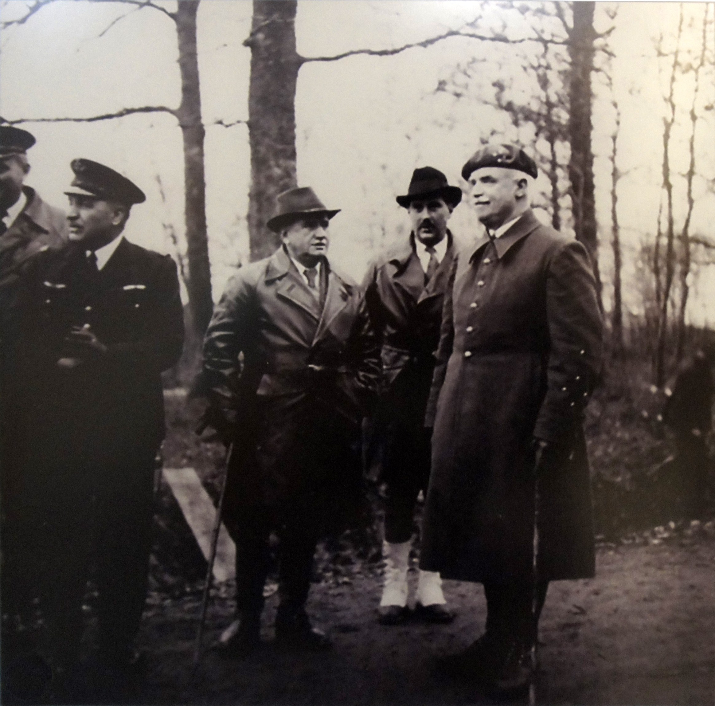 LE 12_XI_1939, présentation du II/4, présent le colonel_Tétu, le général_Villemin, Edouard_Daladier, Guy La_Chambre_et le général Bourret .